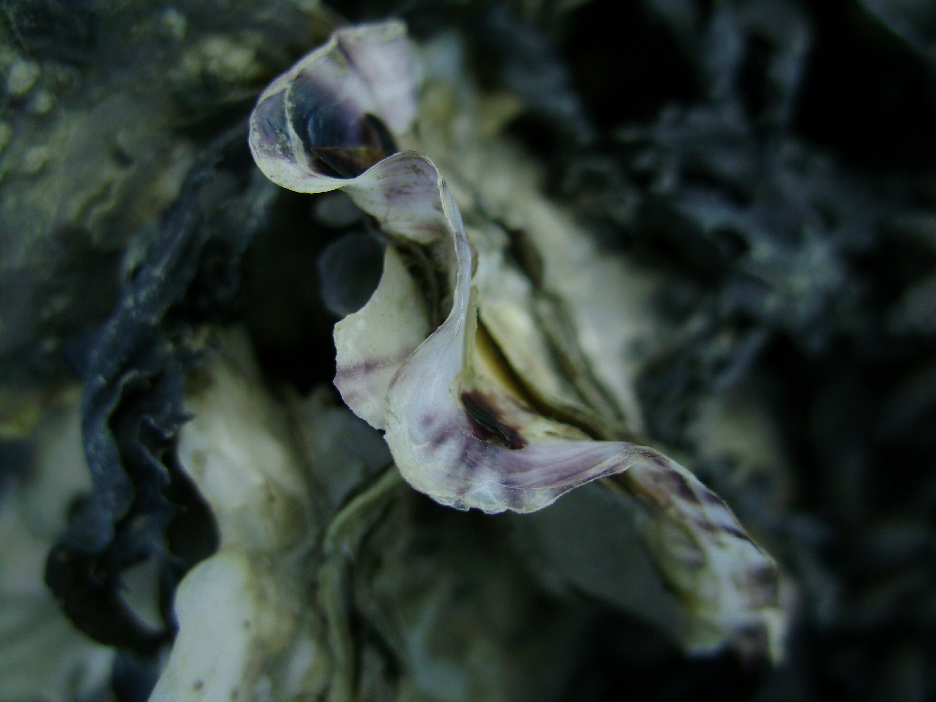 Crassostrea gigas, jeune pousse .JPG